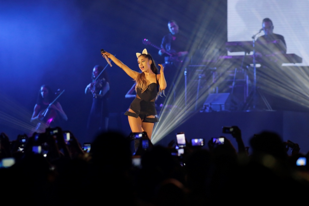 Imagen de la cantante Ariana Grande durante la gira The Honeymoon Tour en su paso por Jakarta (2015).